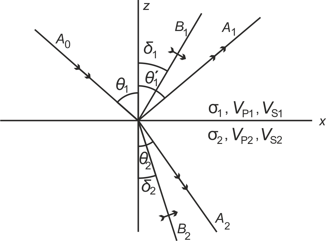 Утворення різнотипних хвиль на границі розподілу двох середовищ